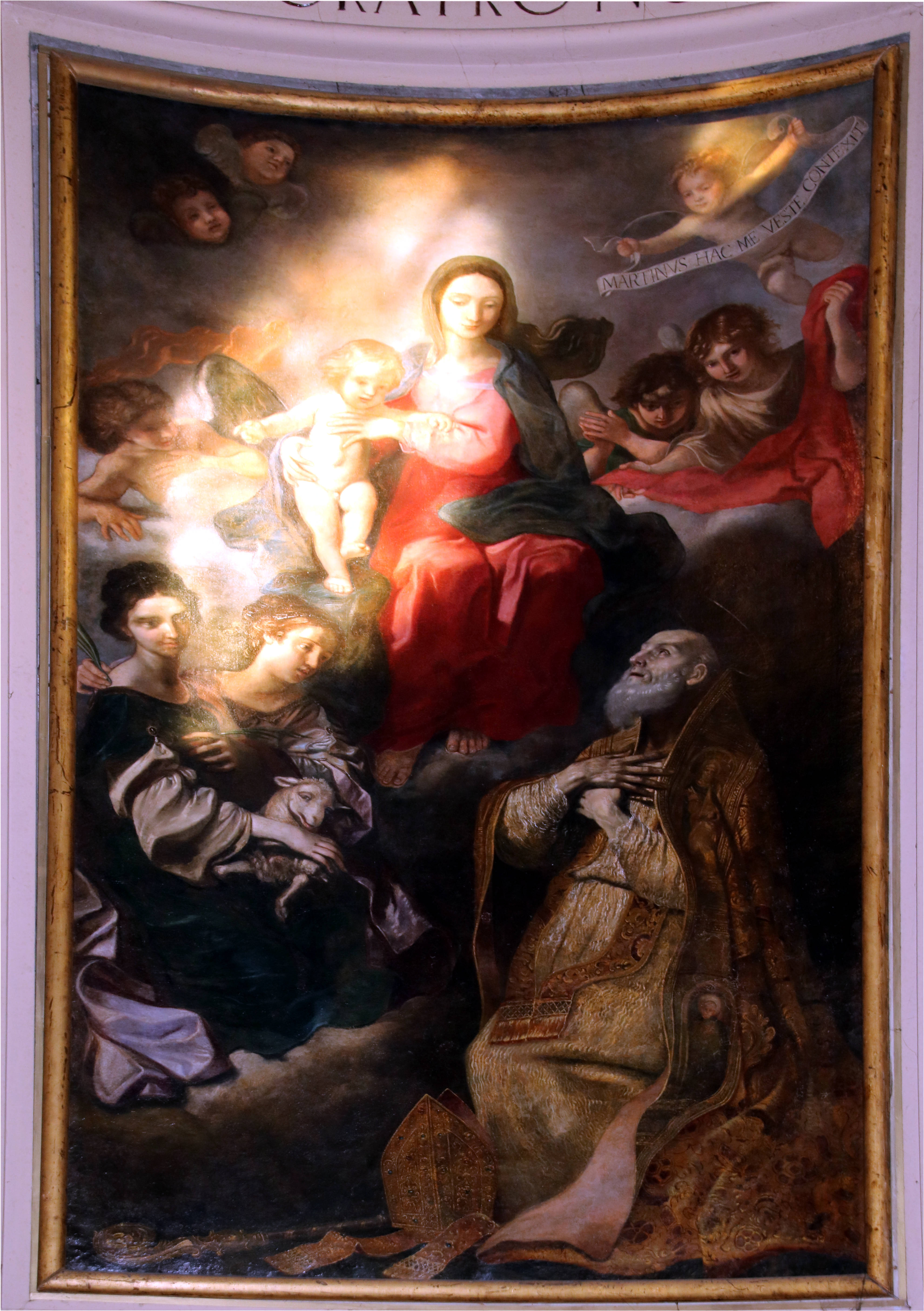 Emilio Taruffi, Madonna con Bambino e i Santi Martino, Agnese e Cristina, 1665, Chiesa di San Martino (Casalecchio di Reno)